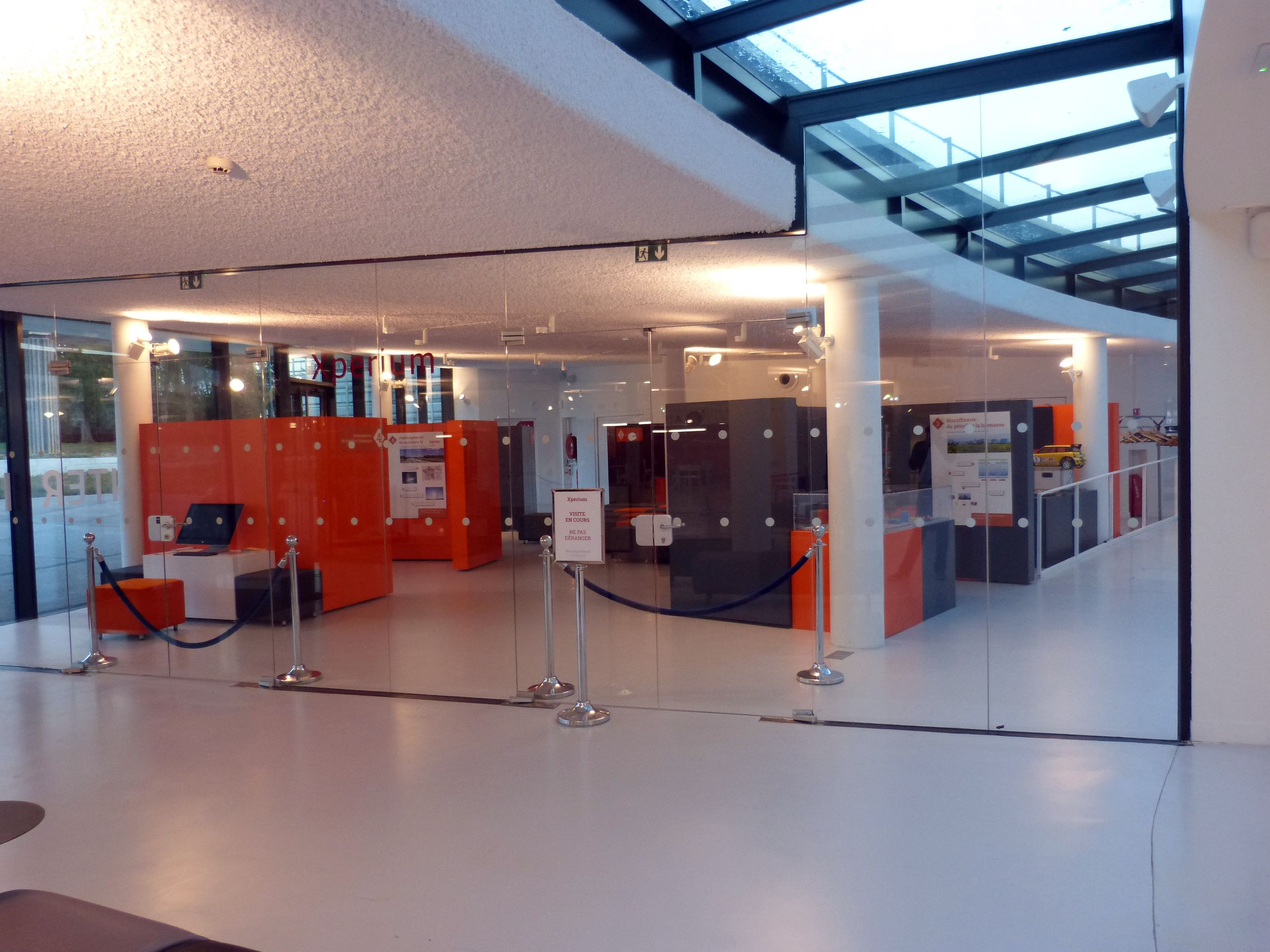 Lilliad Learning Center Innovation - Xperium, Université de Lille Sciences et Technologies, Cité Scientifique, Villeneuve-D'ascq